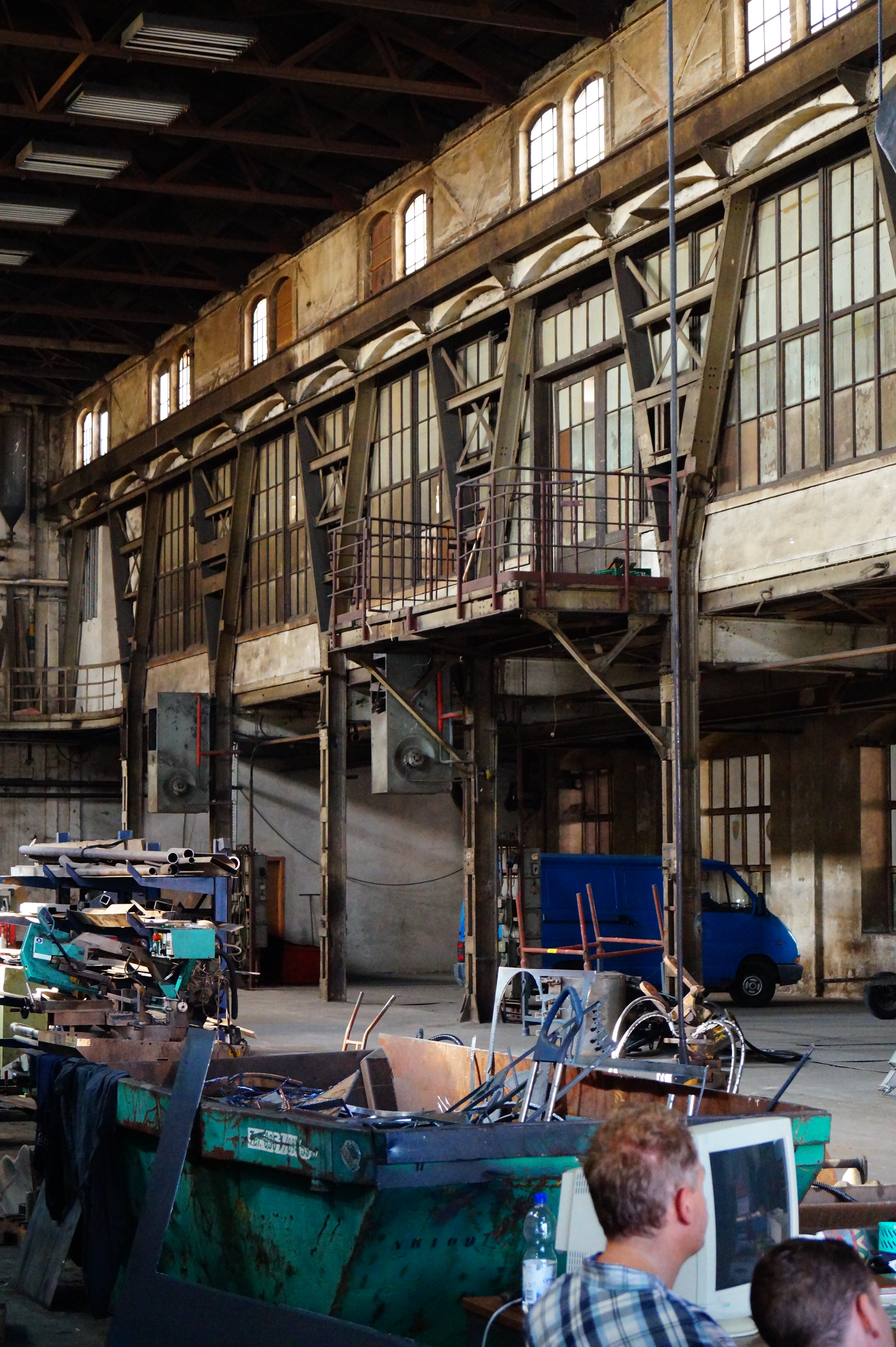 Werkshalle Stand 11.09.2016